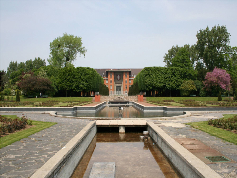 Lycée César-Baggio vu du jardin des plantes de Lille (Nord).